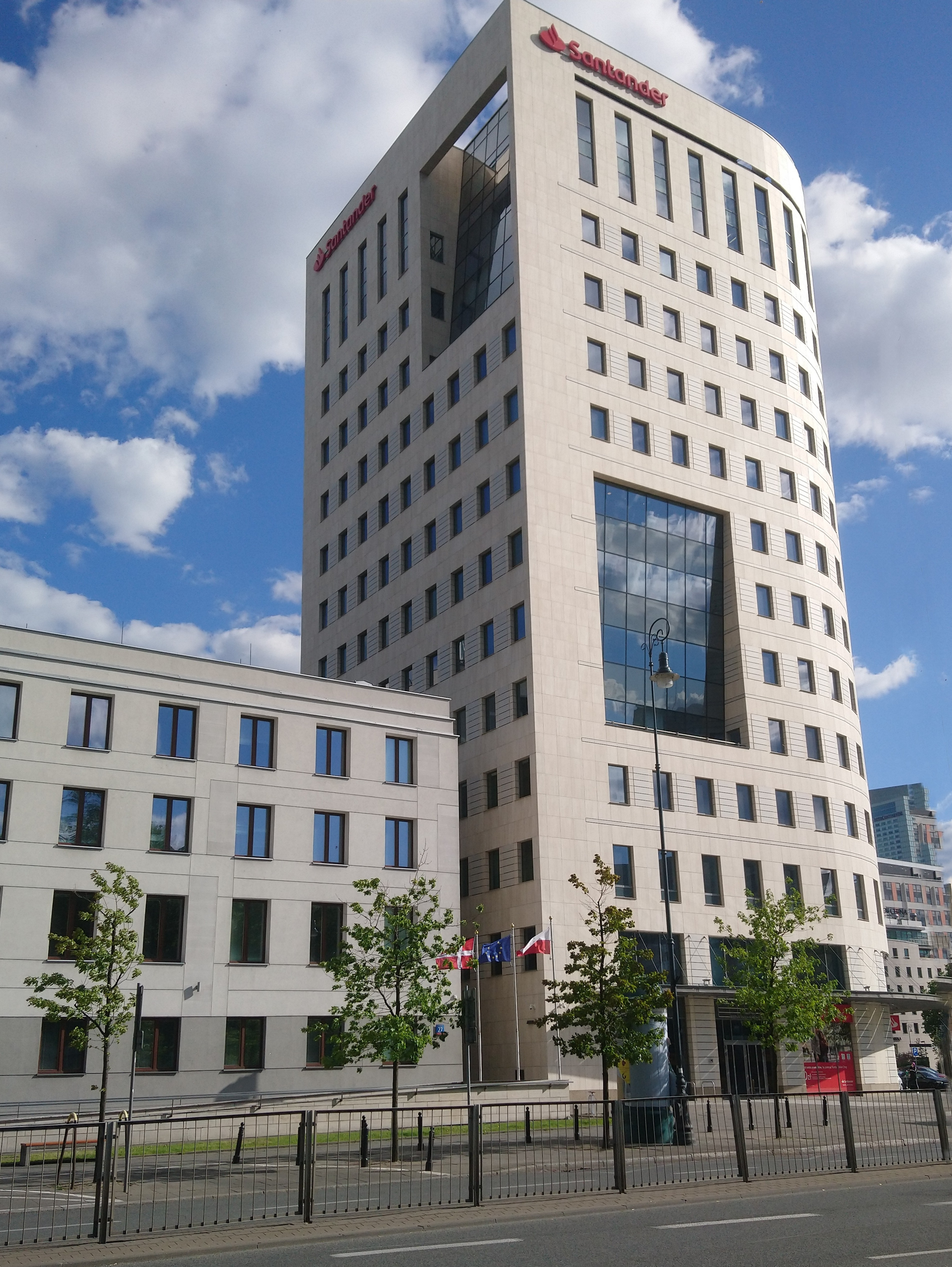 Ambasada Danii w Warszawie